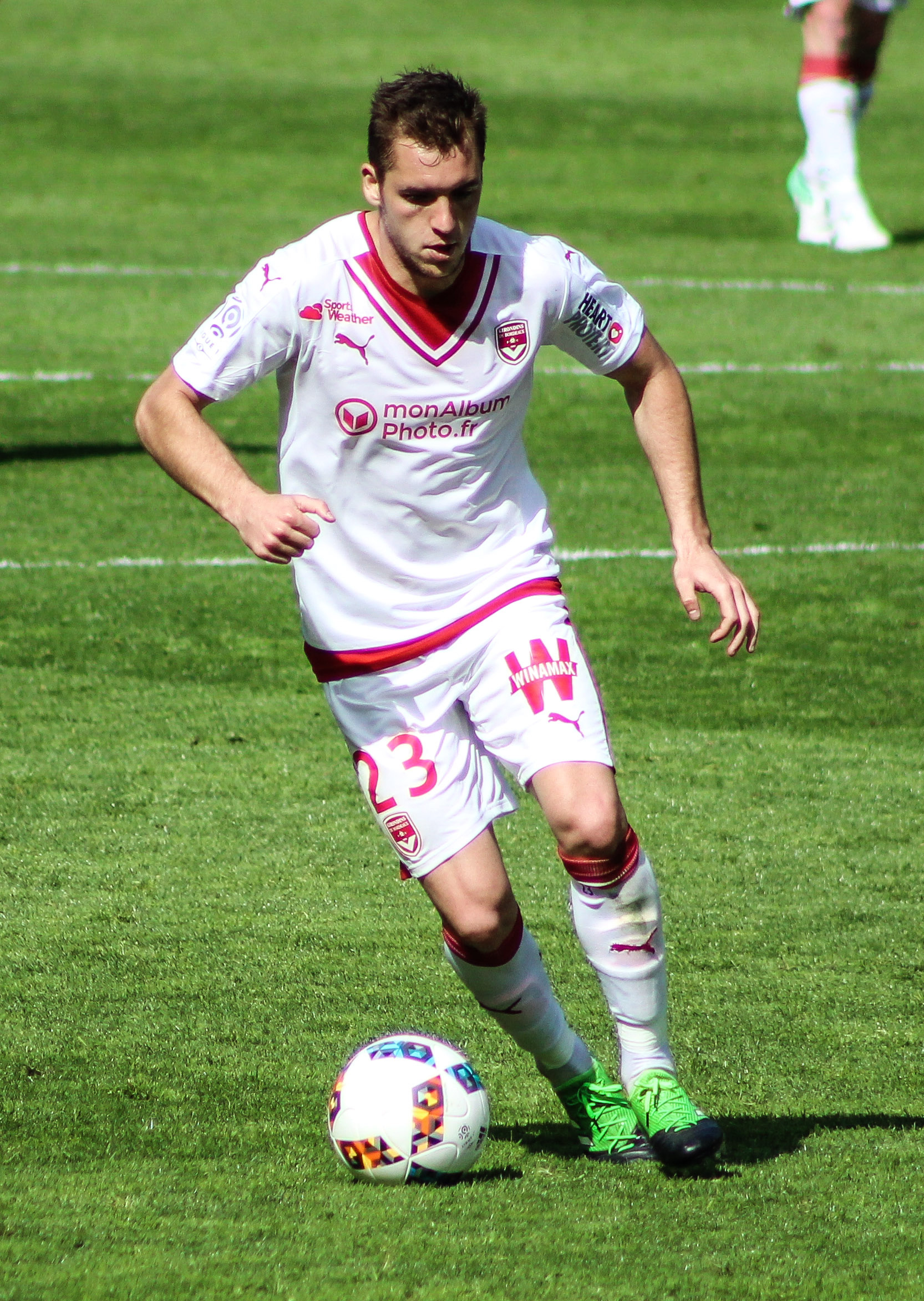 ENGLISH | PORTUGUÊS | FRANÇAIS | ESPAÑOL Follow my work in other social medias | Siga meu trabalho em outras redes | Suivre mon travail dans des autres reseaux | Sigue mi trabajo en otras redes sociales Facebook - F. Neitzke Photo - Instagram - @neitzkef - All my pictures can be republished or shared only after my given consent: Todas as fotos podem ser publicadas e/ou utilizadas mediante meu consentimento Tous les photos peuvent être utilisés ou publiés seulement après ma autorisation Todas mis fotos pueden volver a ser publicadas y compartirse únicamente bajo mi consentimiento dado